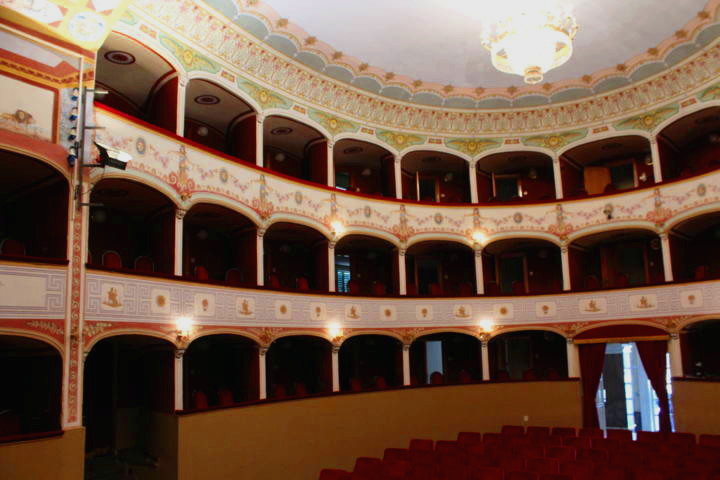 File di palchi del teatro comunale l'Idea in Sambuca di Sicilia. Teatro il stile Liberty costruito nel diciannovesimo (XIX) secolo.